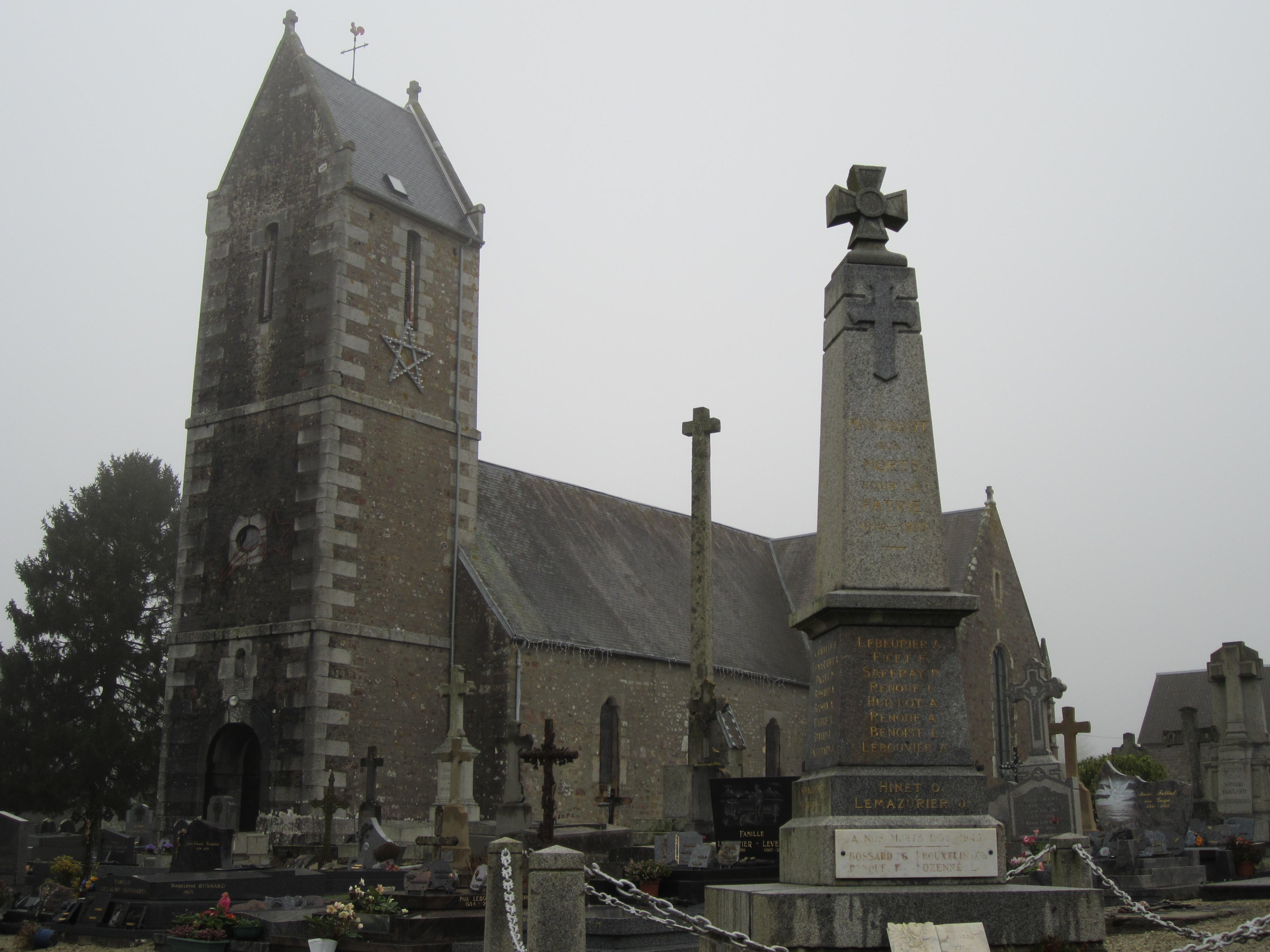 église Notre-Dame de Montabot